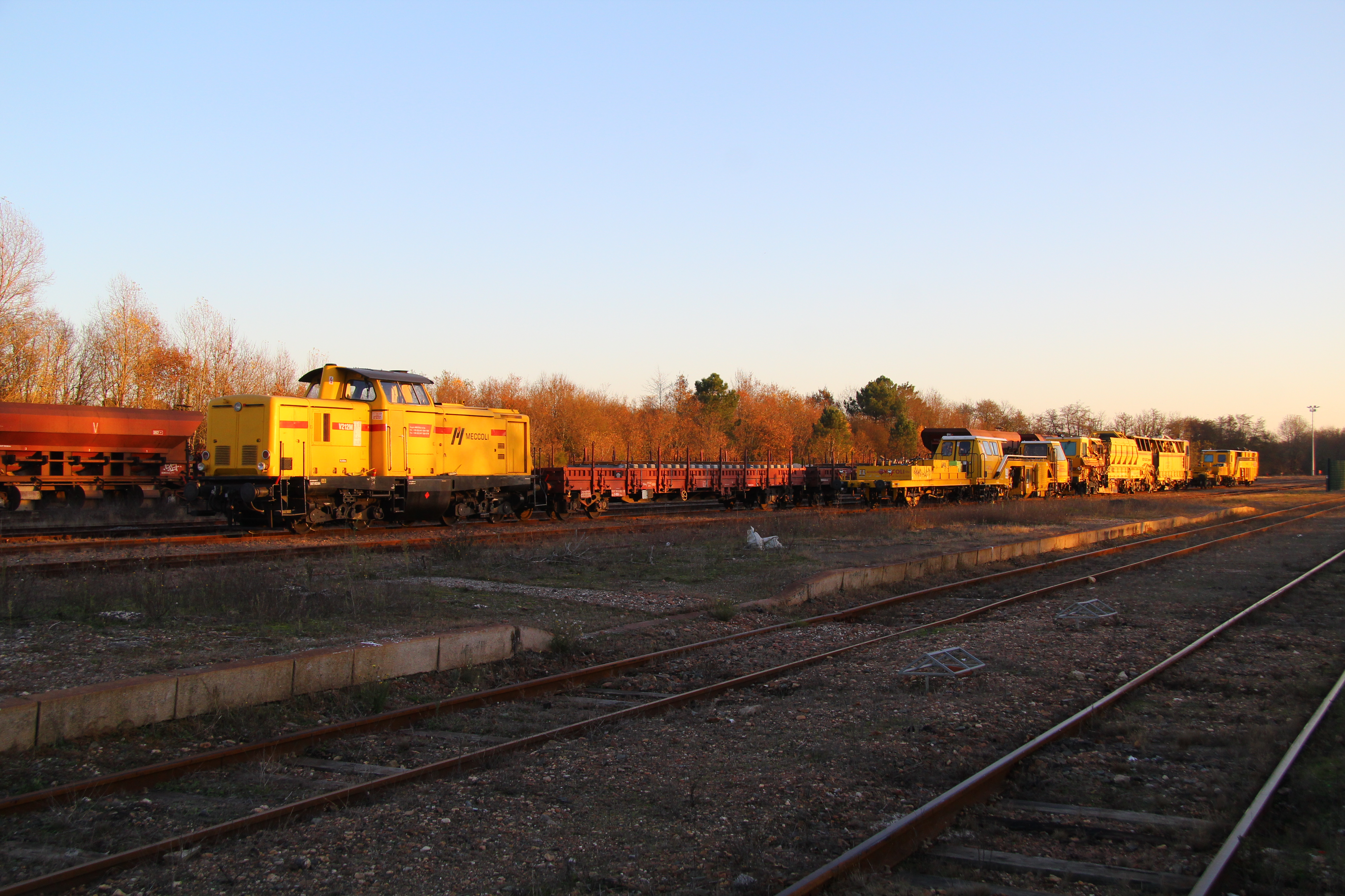 Rassemblement divers de trains de travaux, bourreuses, V212, wagons tombereaux et plats lors des travaux de raccordement de la LGV. Tous sont stationnés à Saint-Mariens- Saint-Yzan, le 30 novembre 2016.